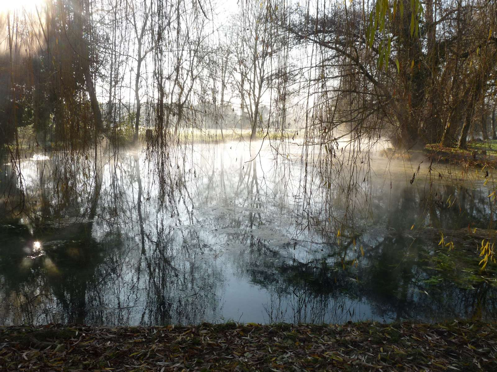 source de la Pallue, Gensac-la-Pallue, Charente, France